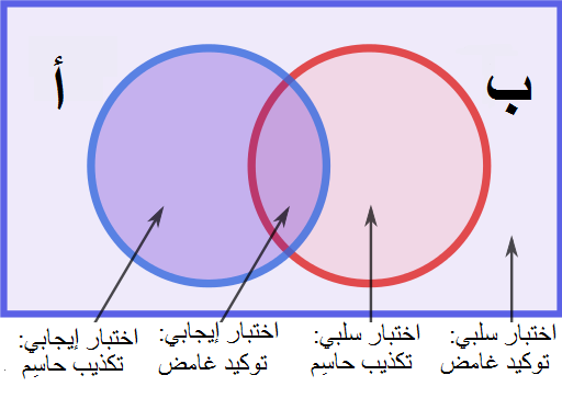 إن كانت القاعِدة الأساسية (ب) تتداخل مع الافتراض الحالي (أ)، فيمكن لاختبار سلبي أو اختبار ايجابي أن يَنفي أ.